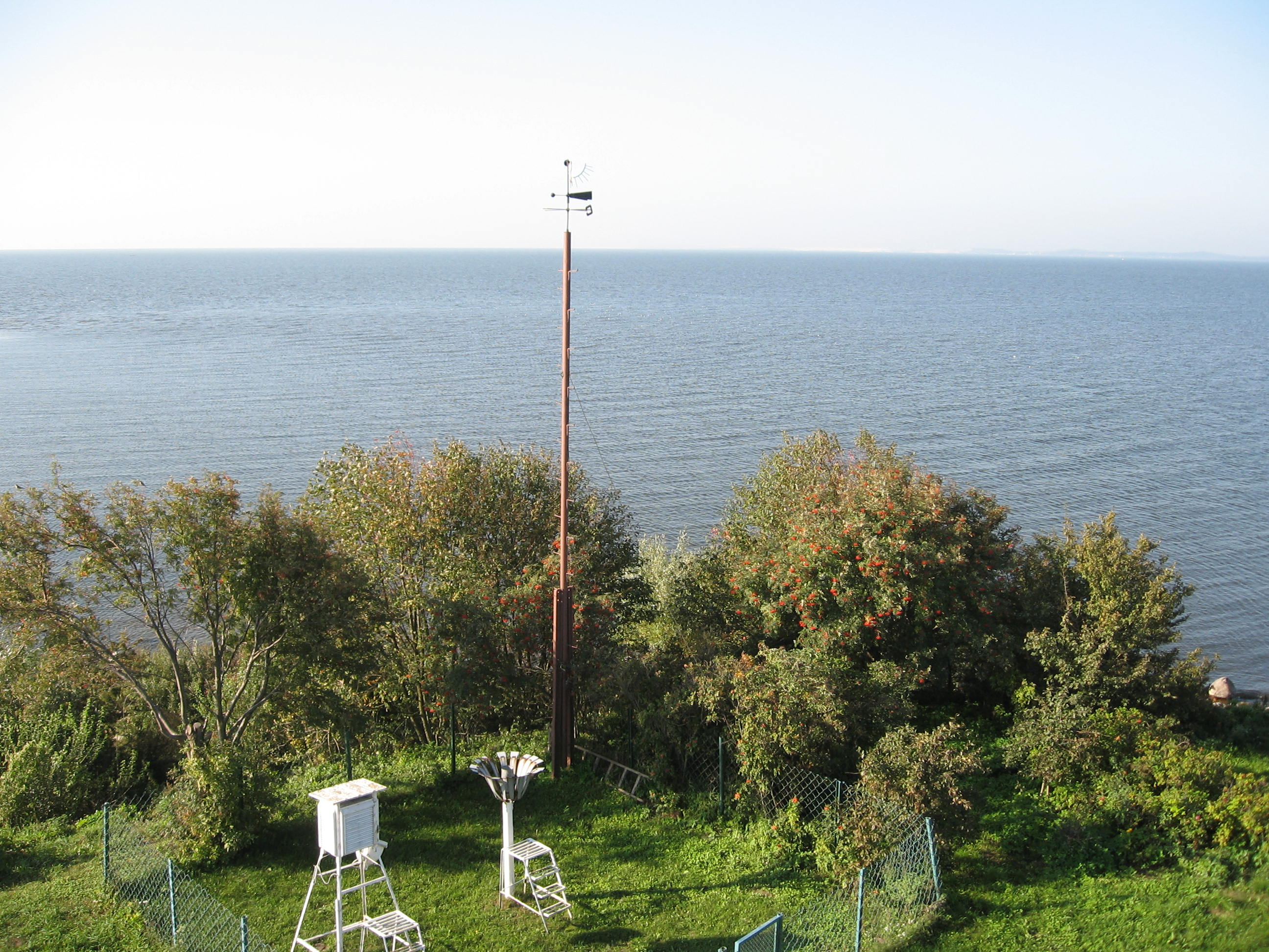 Meteorologinė stotis Ventėje